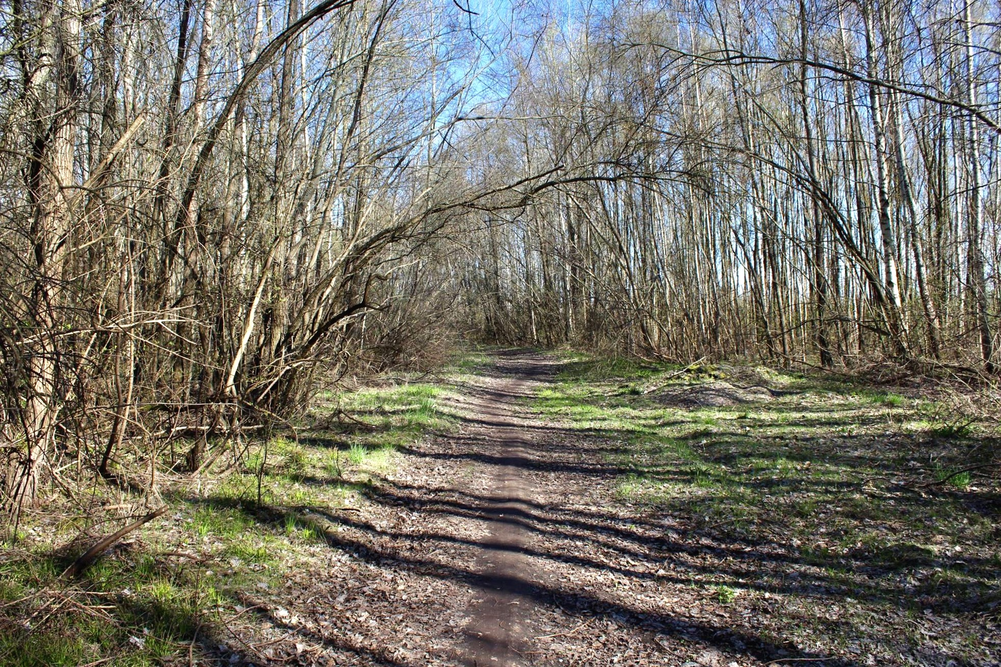 Krēmeri, galvenā taka, kas ved caur mežiņu lieguma Z daļā no Beķergrāvja ielas virzienā uz Daugavu.